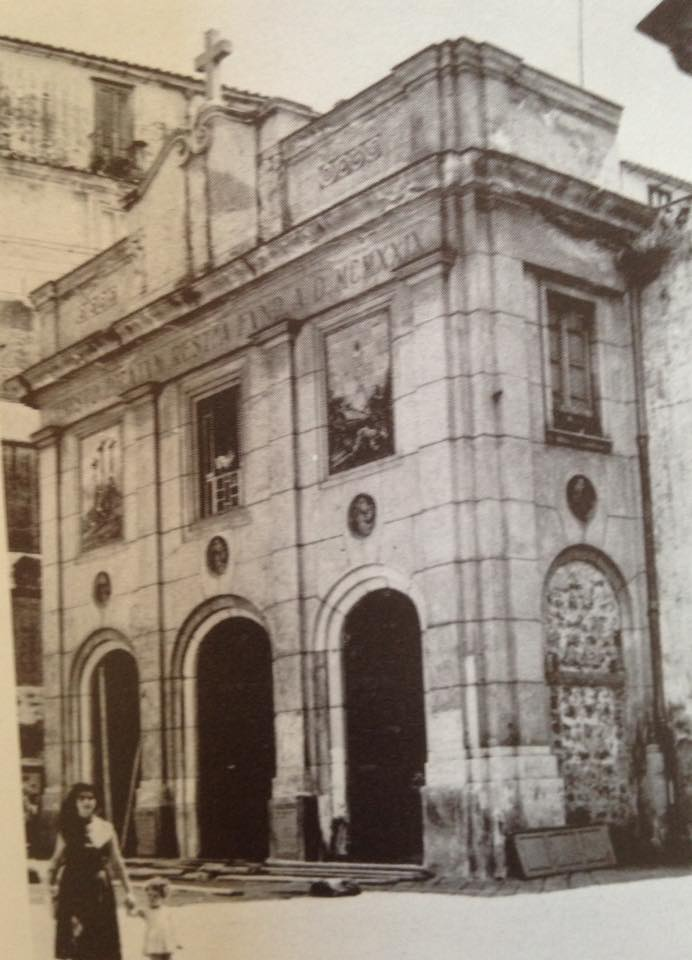 Facciata della chiesa del Crocefisso di Salerno